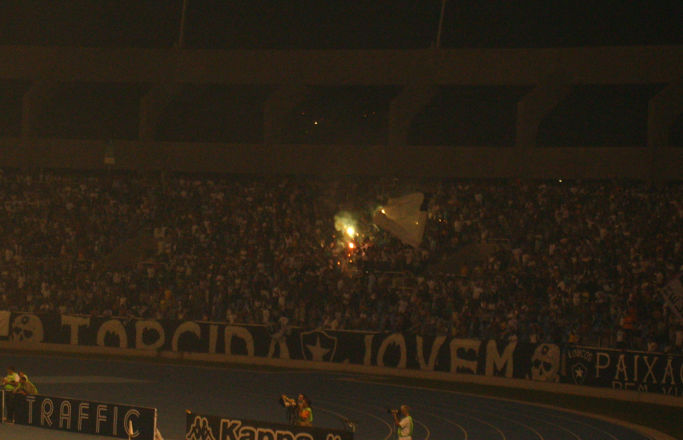 A torcida organizada Torcida Jovem do Botafogo apóia o Botafogo FR na partida contra o Corinthians, válida pelo primeiro jogo semifinal da Copa do Brasil de 2008, em 20 de maio deste ano, no Engenhão.